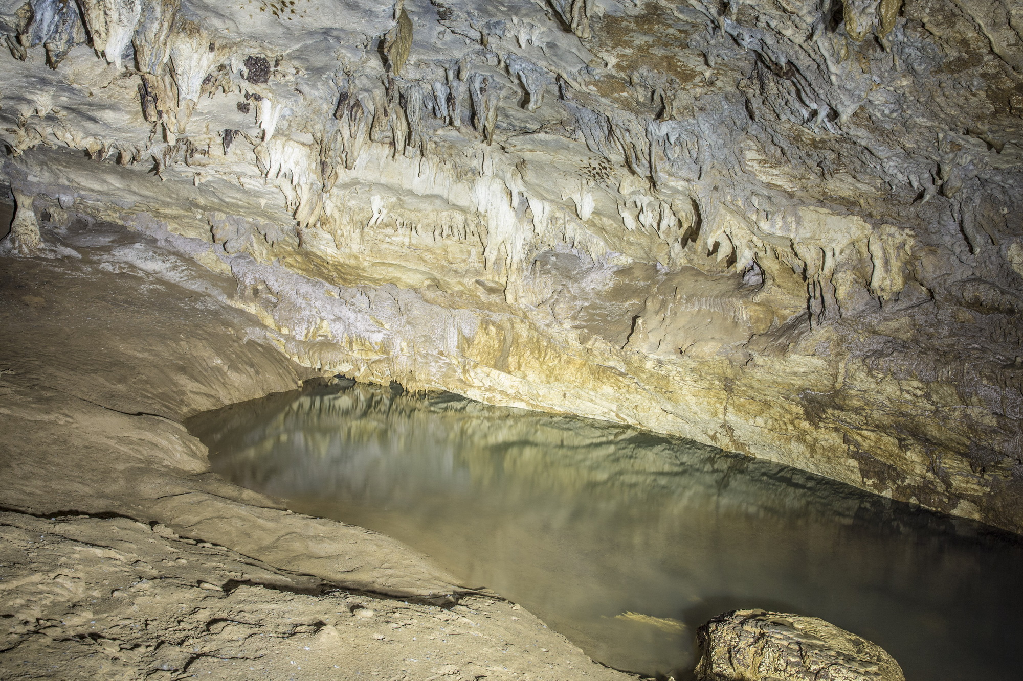 ღლიანას მღვიმის ბუნების ძეგლი ღირსშესანიშნაობა: ქვედაცარცულ კირქვებში გამომუშავებულ მღვიმეს ორი შესასვლელი გააჩნია; პირველი - საიდანაც ძირითადი მიწისქვეშა ნაკადი გამოდის, სიმაღლით 3.5-4 მ, ხოლო სიგანე 7 მ-ია; მარცხენა განშტოება მთავარი შესავლელიდან 35-40 მ-ის დაშორებით ციცაბო საფეხურებით ზედაპირზე ამოდის. აქედან 60 მეტრში ფსკერი 50 მ სიგრძის სიფონურ ტბას უკავია, რომლის სიგანე 3-4 მ, ხოლო ჭერის სიმაღლე 2,5 მ აღწევს. პირველ სიფონს 200 მ სიგრძის წყლიანი და უნაპირო დერეფანი აგრძელებს; აქ წყლის სიღრმე 0,5-2 მ-ია. წყლიან დერეფანს კვლავ სიფონური გალერეა მოსდევს, რომლის სიგრძე 30 მ, ხოლო სიგანე 1-2 მ-ია. იგი კვლავ 150 მ-იან გალერეაში გადადის, რომლის ჭერი თითქმის მთელ სიგრძეზე ნაღვენთი ფორმებითაა დაფარული. ეს წყლიანი გალერეა მღვიმის ბოლომდე კვლავ რამდენიმე სიფონურ გასასვლელს ივითარებს, ხოლო ბოლოში 20-30 მ სიგრძეზე ჭერის დადაბლების გამო გადაადგილება ძალზე გაძნელებულია. ღლიანას მიწისქვეშა დინების დებეტია 50-55 ლ/წმ (წყალმცირობისას), ეს ნაკადი მღვიმიდან გამოსვლის შემდეგ, მდ. ყუმის ვოკლუზურ წყაროებს უერთდება. მღვიმის მშრალ დერეფნებში ღამურების მრავალრიცხოვანი კოლონია ბინადრობს. მდებარეობა: წყალტუბოს მუნიციპალიტეტი, სოფ. ყუმისთავი, პრომეთეს მღვიმის მიმდებარედ, 142 მეტრი ზღვის დონიდან. კოორდინატები: N42 22.338 E42 35.842